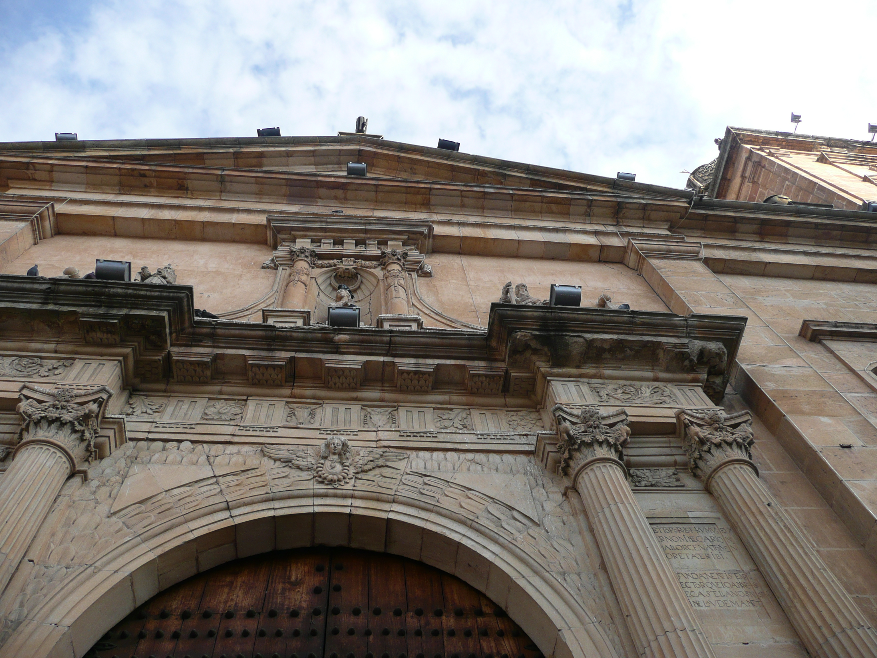 Basílica metropolitana de Santiago de Tunja, Plaza Mayor - Tunja, Boyacá (Colombia)